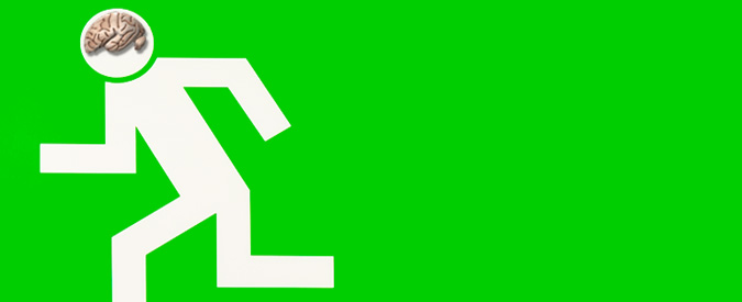 Rita, “non più govane ricecatrice precaria” italiana, ha deciso di trasferirsi in America per continuare le sue ricerche ed ha scritto al Presidente Napolitano per raccontare le ragioni della sua scelta.